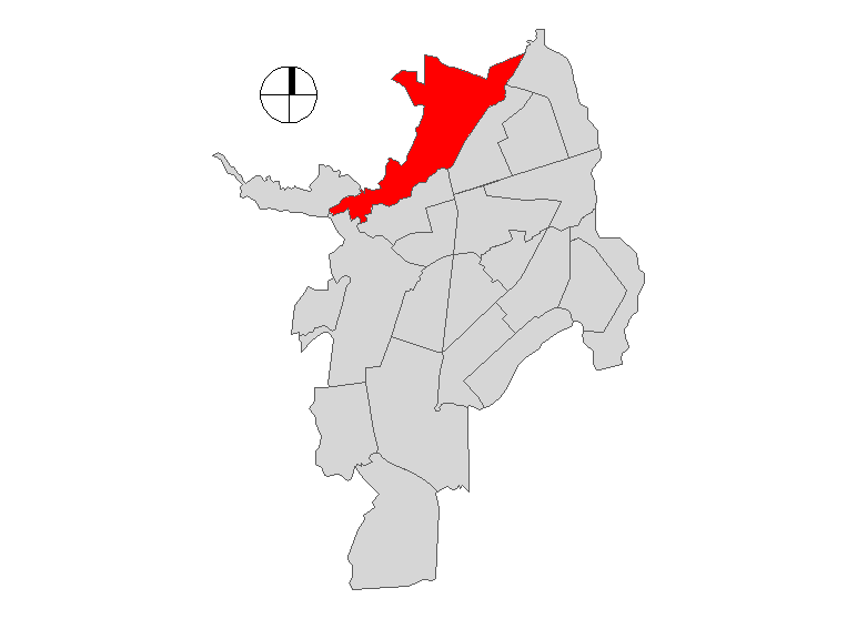 Comuna 2 de Santiago de Cali, Colombia.